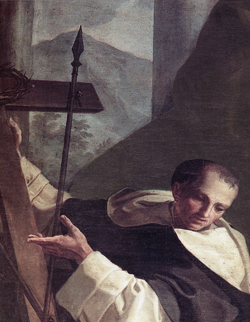 Dipinto olio su tela del Beato Giovanni Liccio